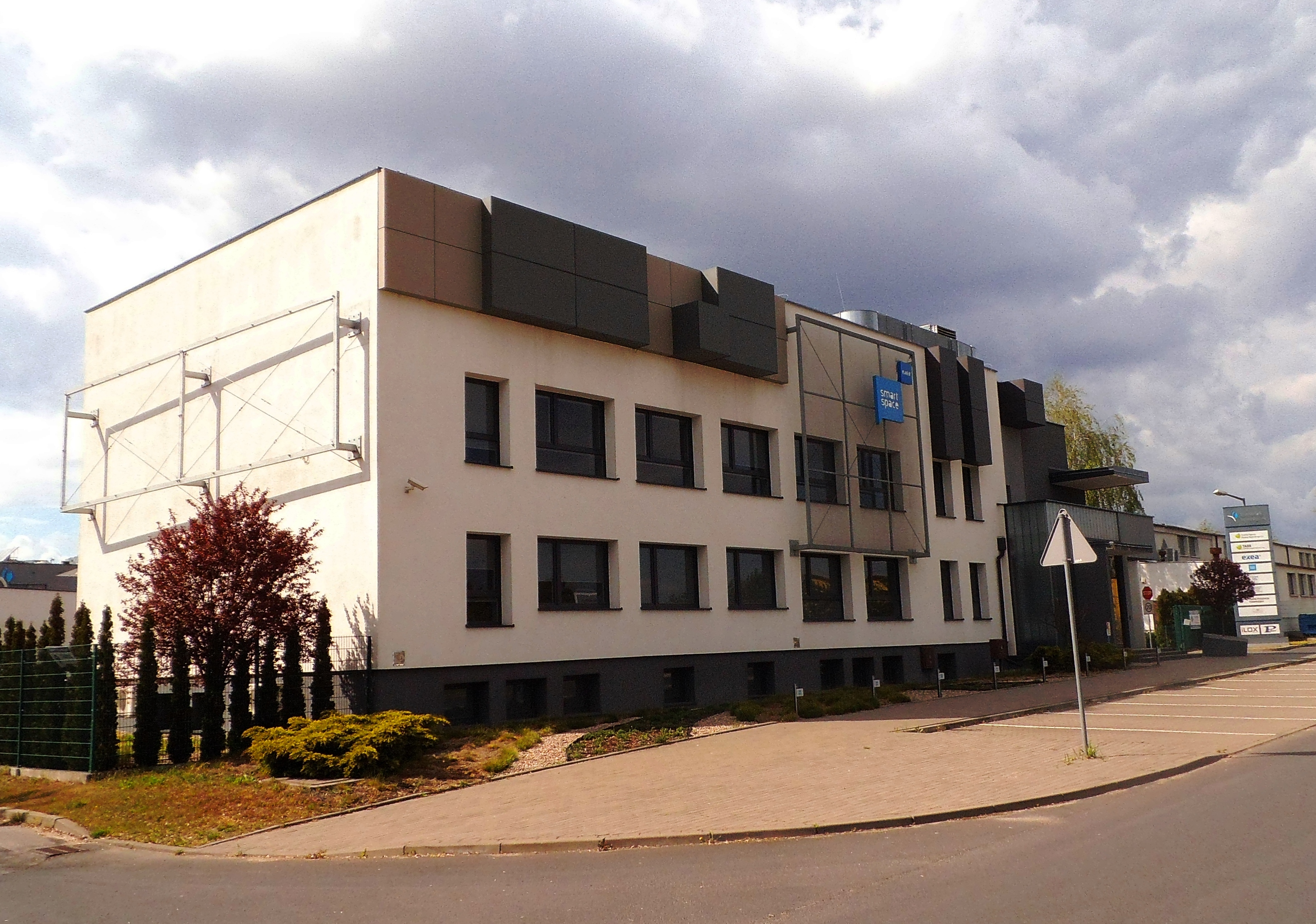 Inkubator Smart Space w Toruniu